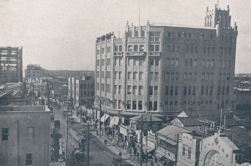 新宿通り 1920年代末